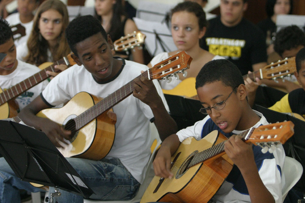 Projeto Guri, em Poá - SP